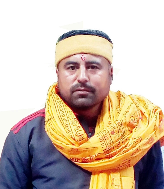 adyaksh